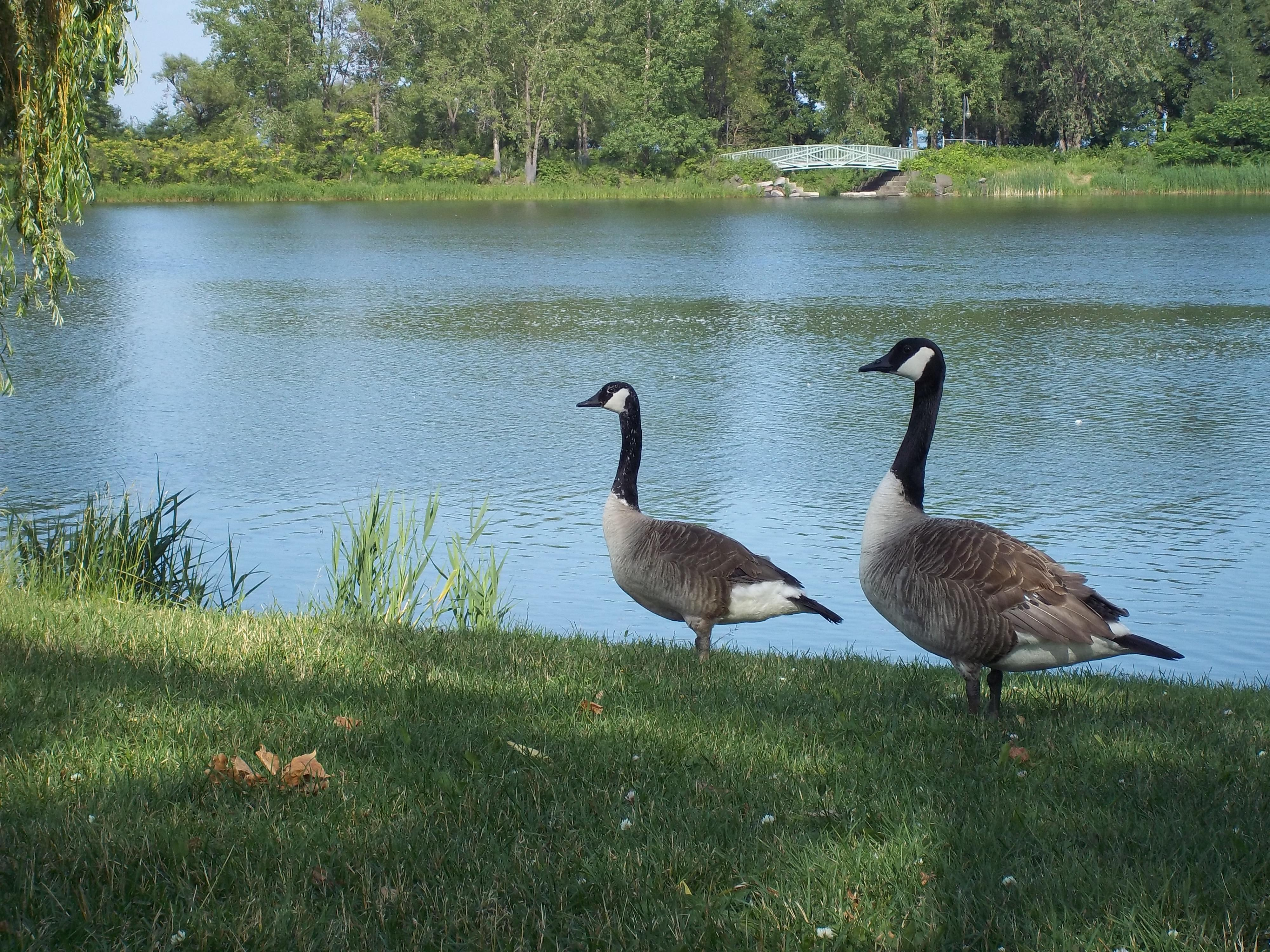 Groupe d'outardes, Parc des Rapides, LaSalle, Montréal, Québec